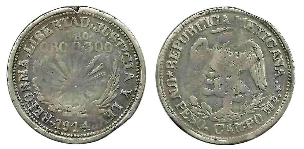 1 peso de Campo Morado de 1914 (canto estriado)(plata).